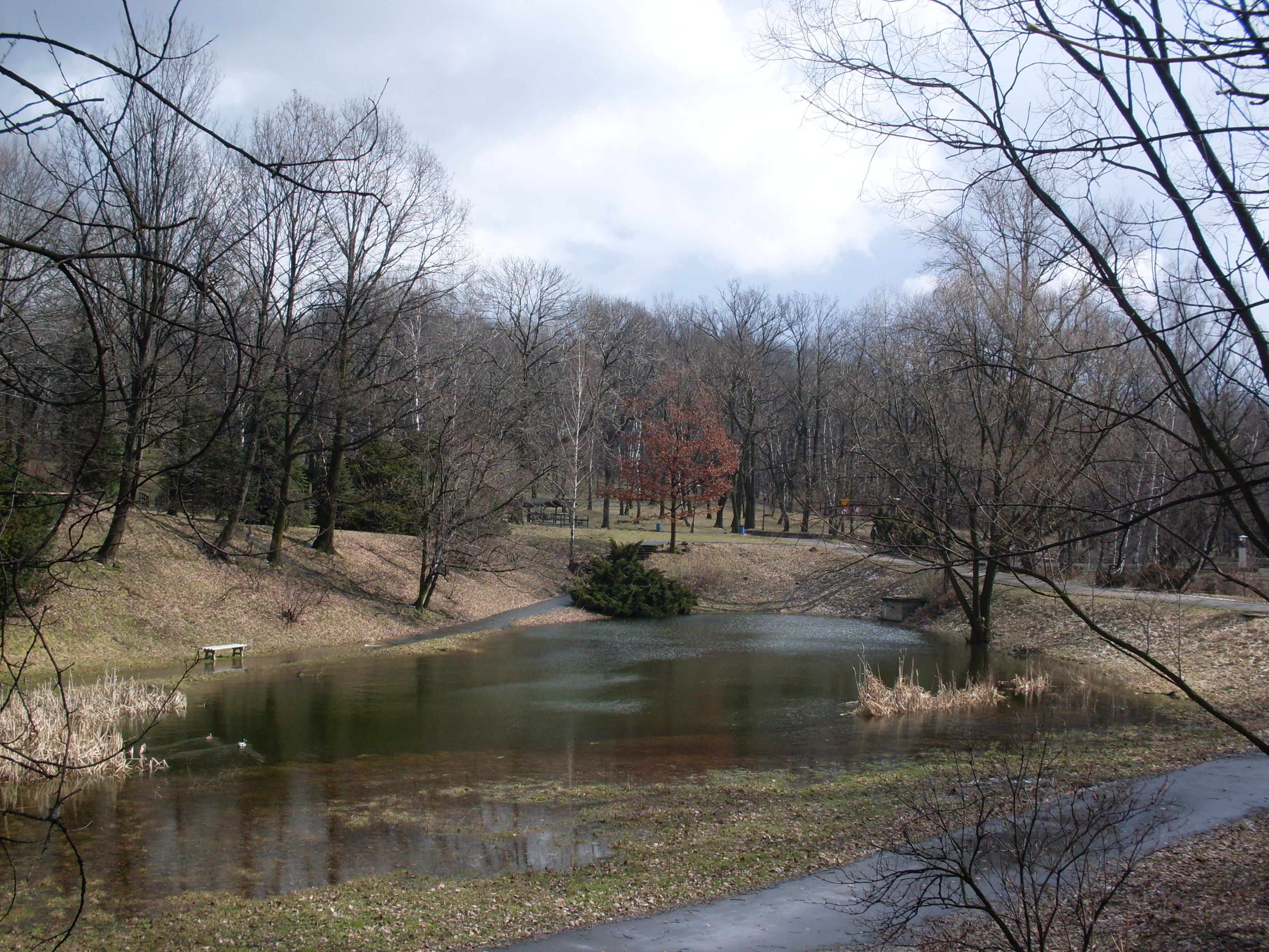 Chorzów - Wojewódzki Park Kultury i Wypoczynku -fragment